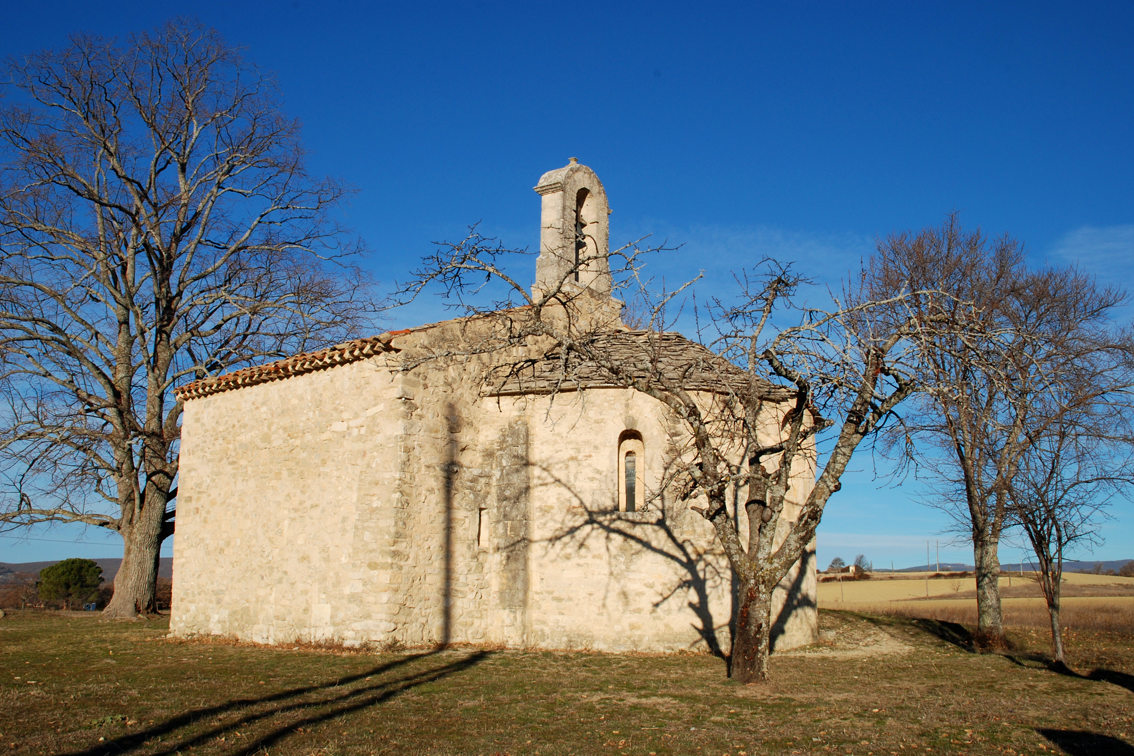 France - Provence - Chapelle Saint-Pierre de Pierrerue